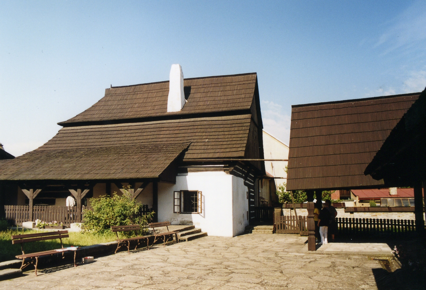 Stara szkoła w Českiej Skalicy. Część Muzeum Boženy Němcovej.